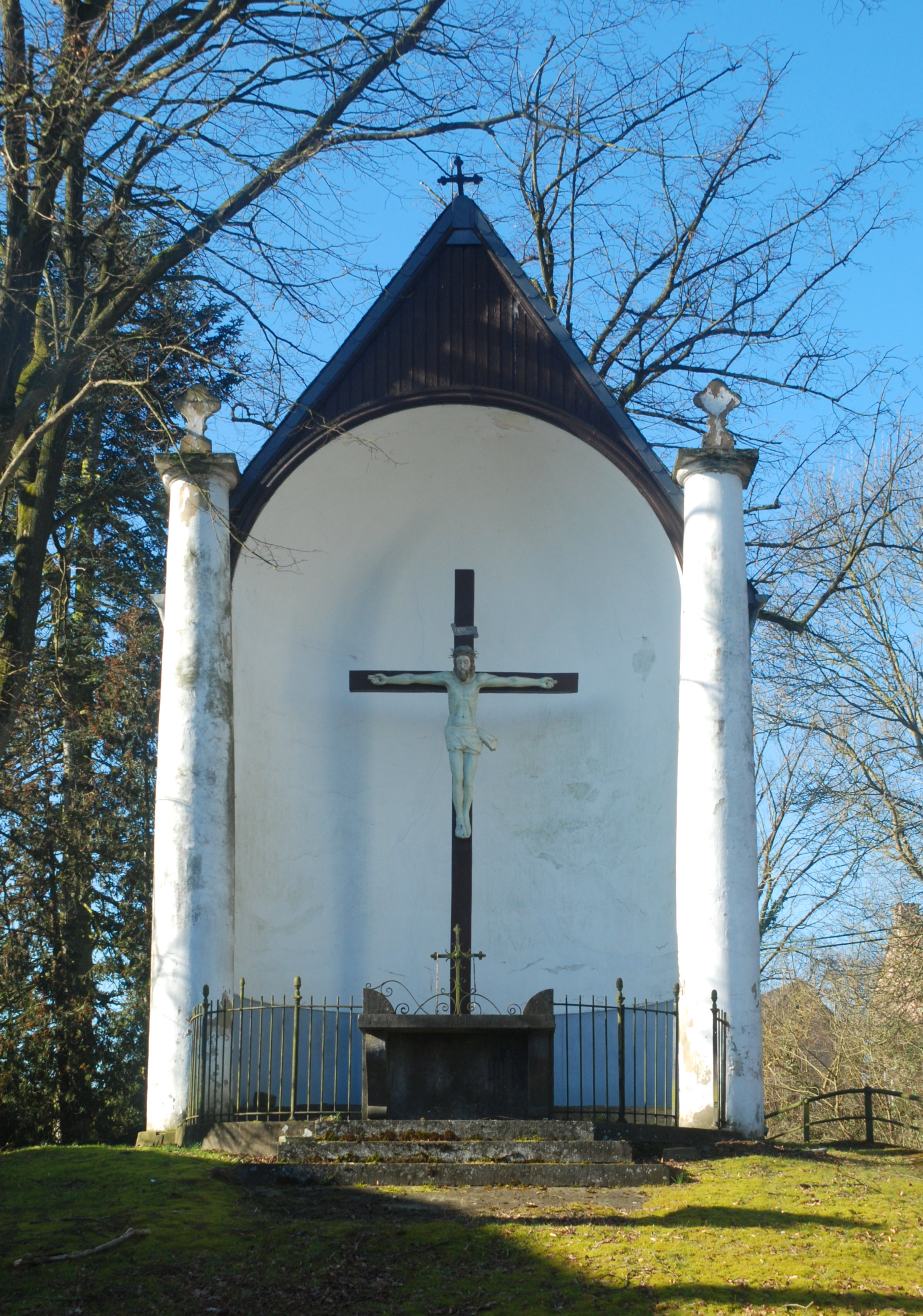 Belgique - Court-Saint-Étienne - Calvaire de la Mission des Rédemptoristes (rue Defalque, face au n° 61) - Région wallonne 25023-INV-0031-02 This photo of immovable heritage has been taken in the Walloon Region